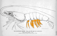 pattes natatoires